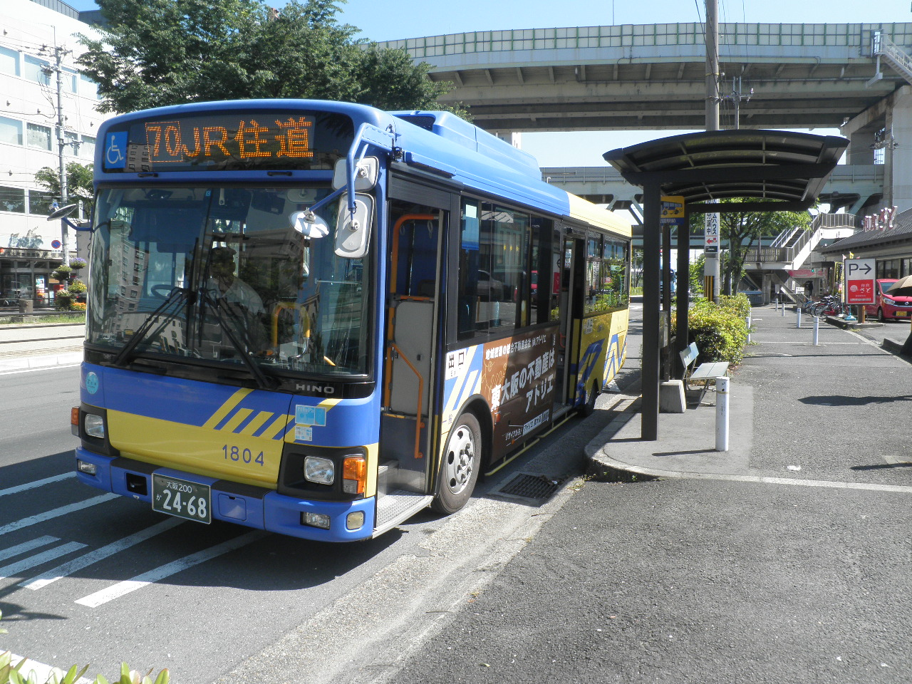 吉田住道線のバス